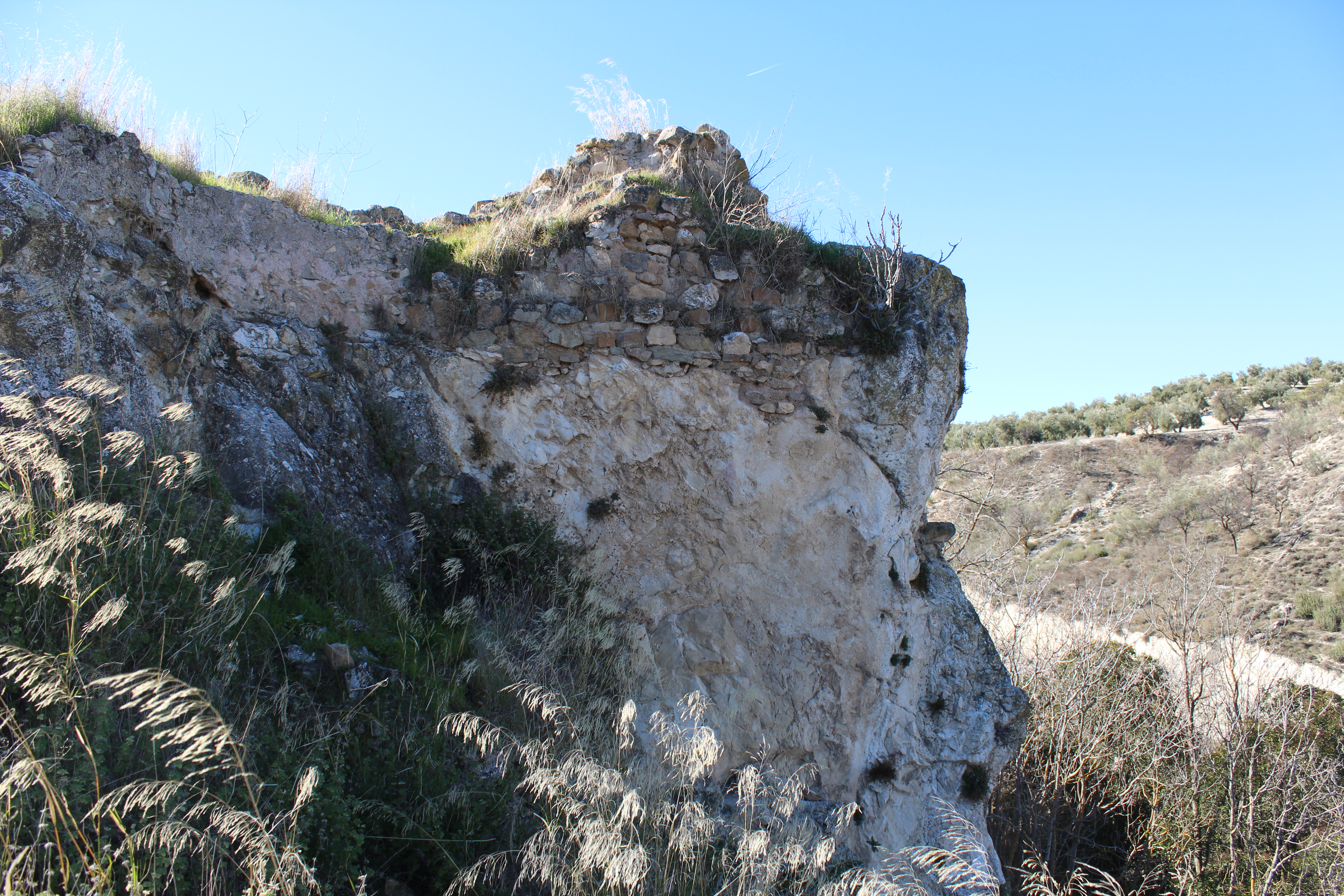 Uno de los arranques de las torres del Castillo de Recena.